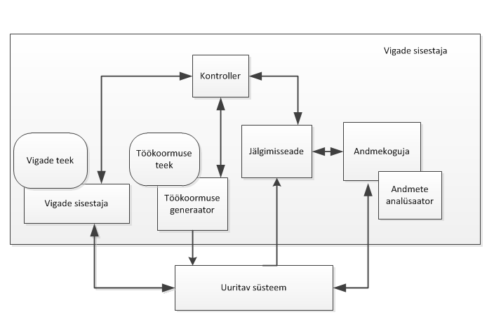 Vigade süstimisseade koos uuritava süsteemiga